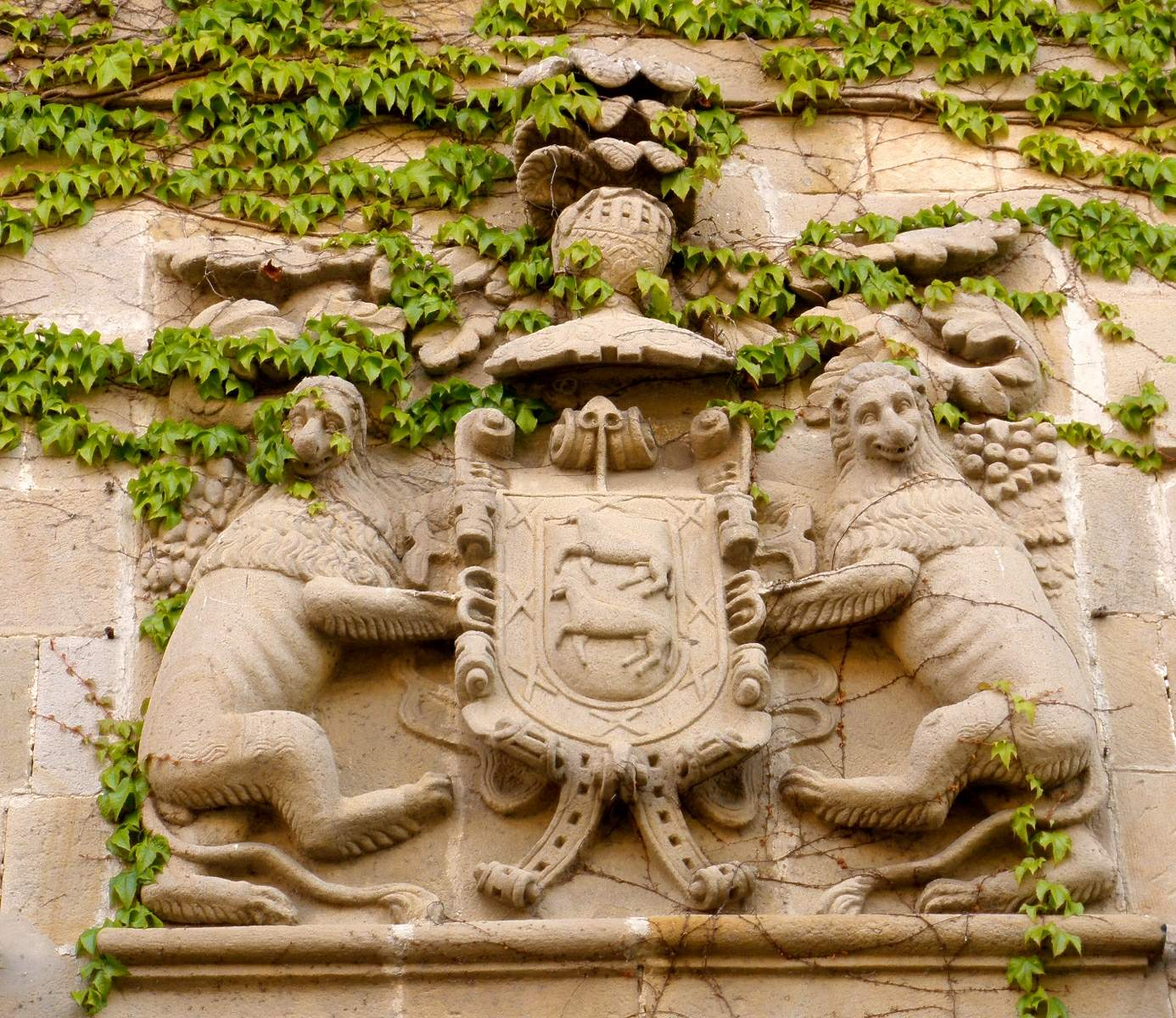 Casa Azkarraga, en Salvatierra-Agurain (Álava, País Vasco, España)